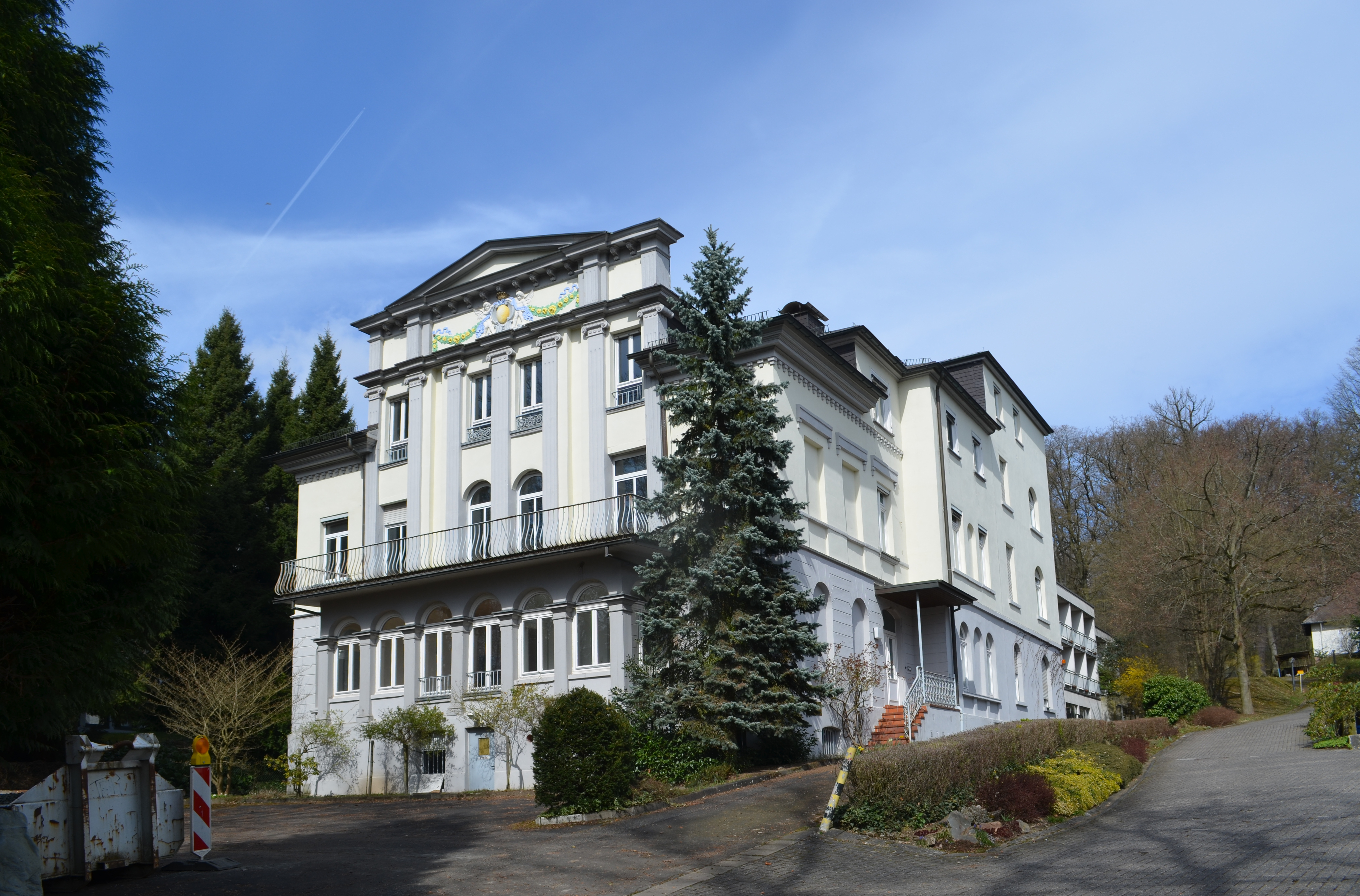 Bad Homburg, Paul-Ehrlich-Weg 2. Nach 1870 im Gegenüber zu den Kuranlagen erbaute, später als Kurpension betriebene Villa. Ursprünglich schlichter, klassizistischer Kubus (1884, 1907, 1912 im Volumen stark erweitert) mit ausschließlicher Frontausbildung im Stil der italienischen Hochrenaissance. Stockwerkübergreifende Vertikalgliederung durch die zwischen die Horizontallinien von Sockel und verkröpftem, übergiebeltem Gebälk eingestellte, ionische Kolossalordnung. In der Gesamtwirkung jedoch von dem vor das spundierte Erdgeschoss gelegten Anbau erheblich beeinträchtigt. Kulturdenkmal aus architekturgeschichtlichen Gründen. Ab 1914 als Sanatorium Villa Hildegard genutzt, dann Kinderheim, Müttergenesungsheim der NS-Frauenschaft, später Reserve-Lazarett. Nach dem Krieg Brdchlagnahmung von der US-Besetzungsmacht, u.a. zeitweise Nutzung durch General Lucius D. Clay und andere hochrangige US-Militärs. Es folgte die Nutzung für Kriegsblinde.